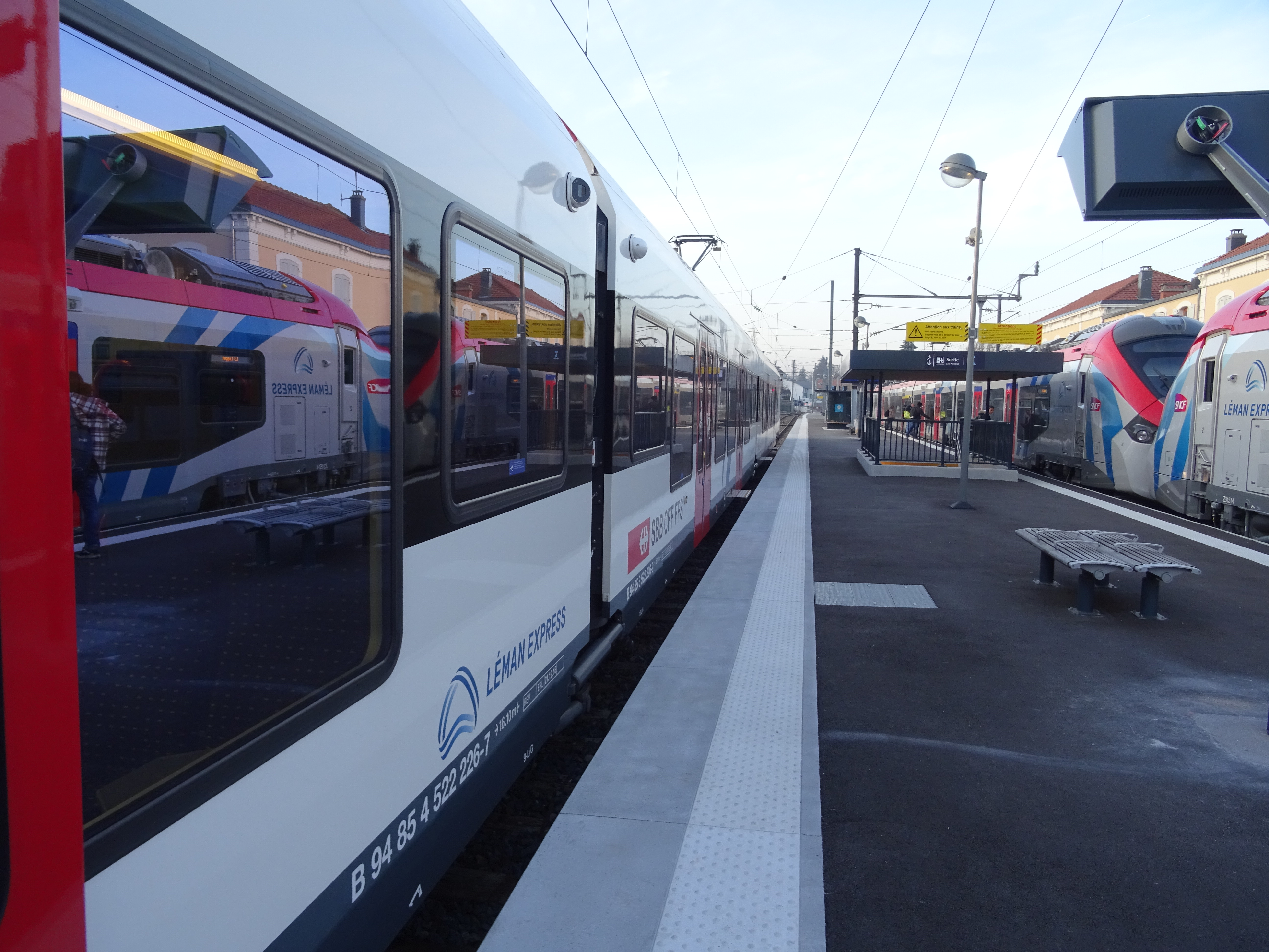 Croisement de Régiolis Léman Express en gare de la Roche-sur-Foron.